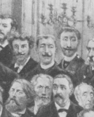 "Assaut du comte de Bondy et de Lafaugère" (détail)